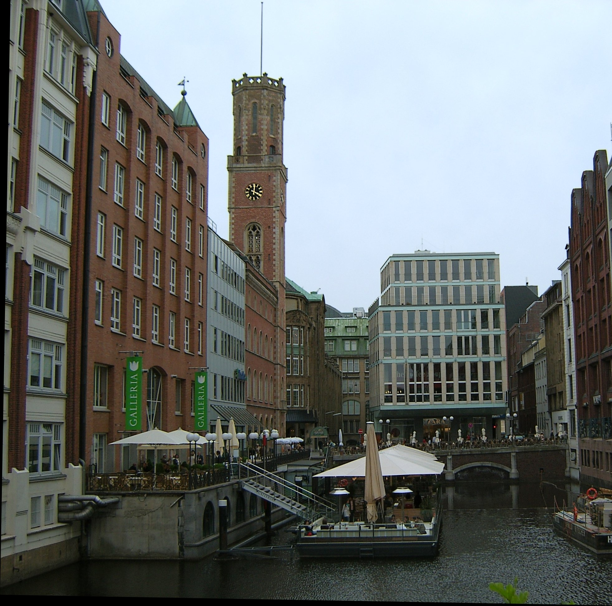 Die Alte Post in der Poststraße in der Hamburger Neustadt wurde 1845 bis 1847 von Alexis de Chateauneuf erbaut. This is a photograph of an architectural monument.